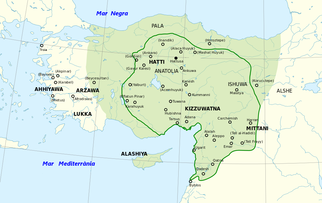 Ciutats de l'imperi hittita.